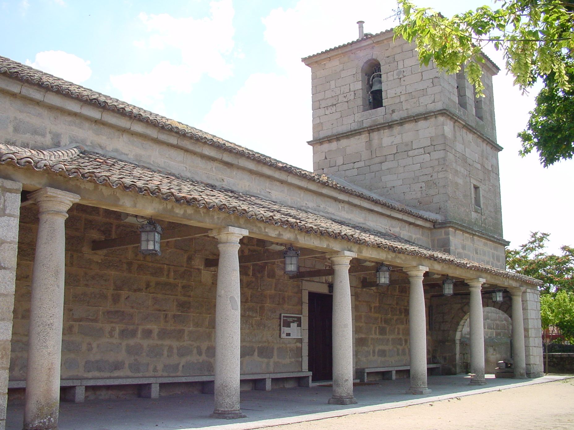 Iglesia de Collado Villalba.